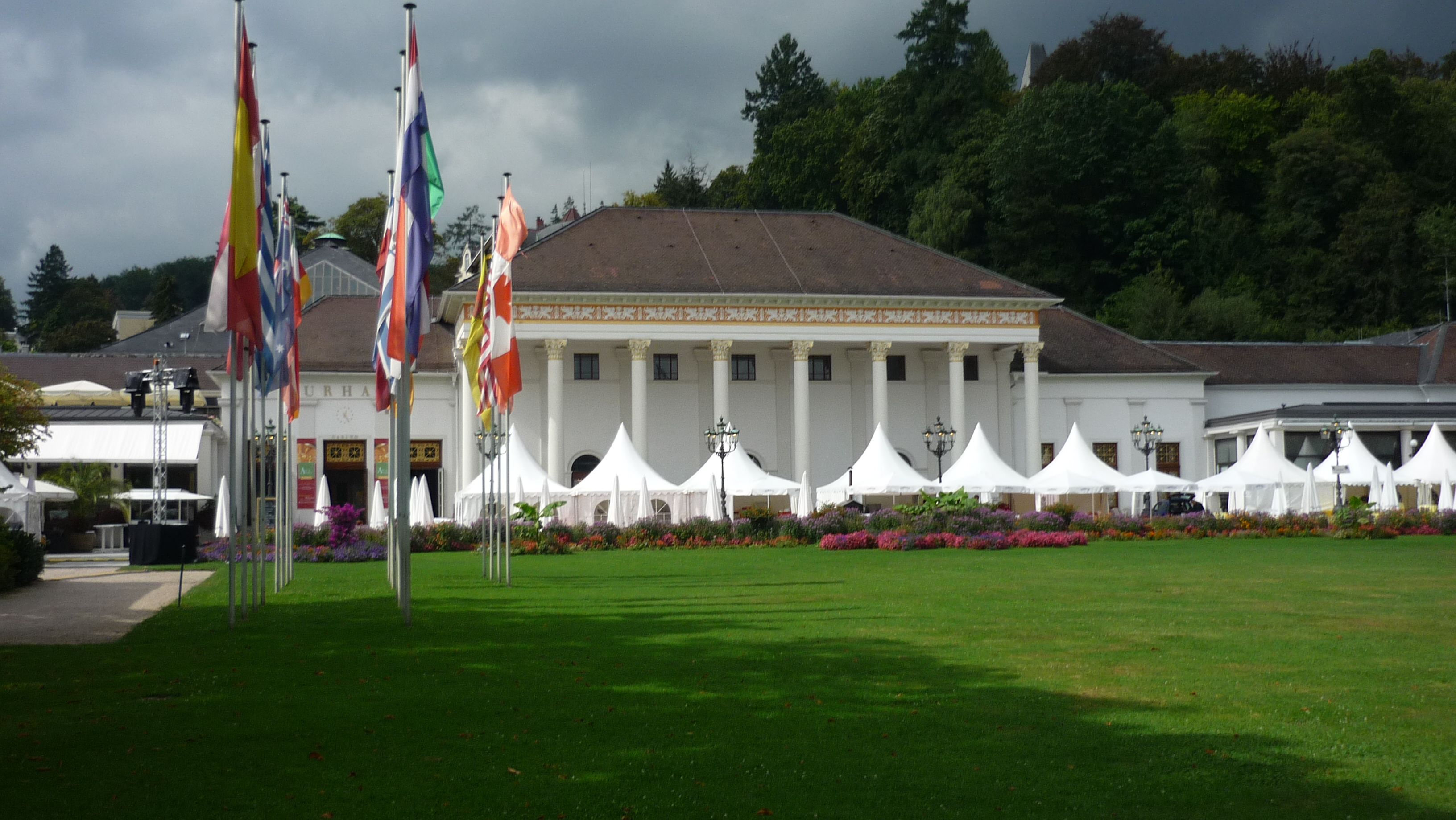 Vue d'ensemble du casino de Baden-Baden (Allemagne).